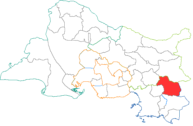 Situation du canton dans le département des Bouches du Rhône (France)